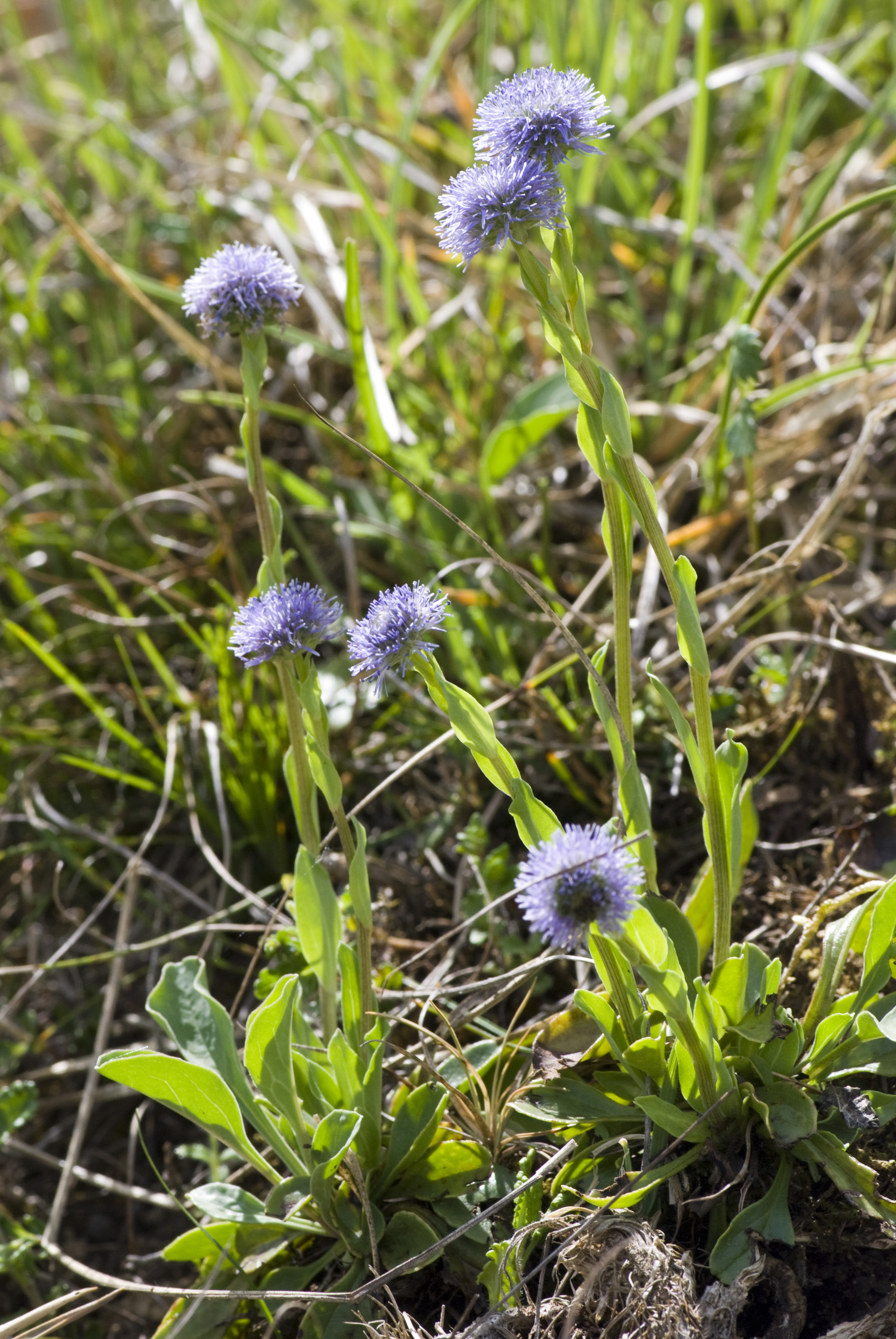 Globularia bisnagarica Chauvoncourt (Meuse), France